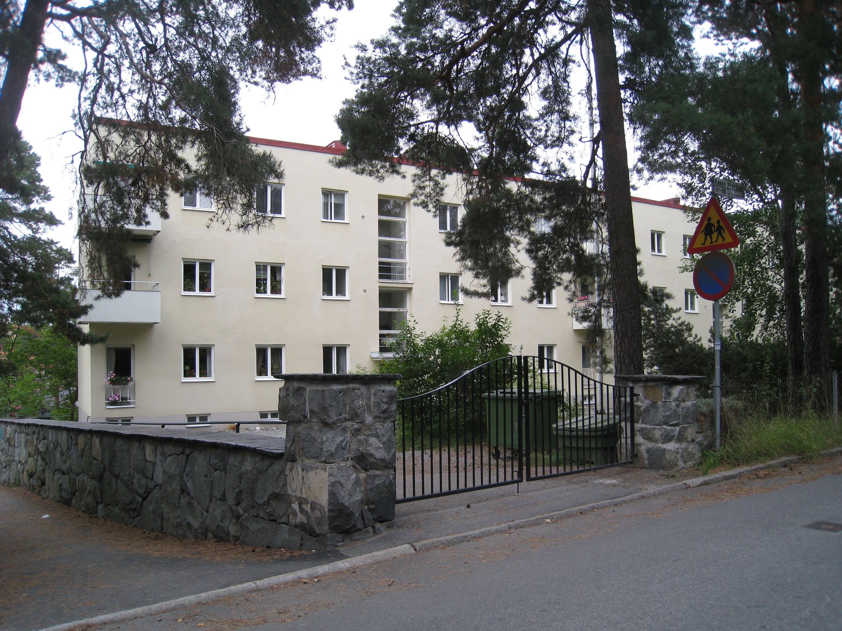 Brommahemmet vid Runda Vägen 17-21 i Alvik i Bromma, väster om Stockholm. Brommahemmets pensionärsboende är ett smalhus/lamellhus om tre våningar med souterräng och uppfört i mitten på 1930-talet. Arkitekt till huset är Birger Borgström.